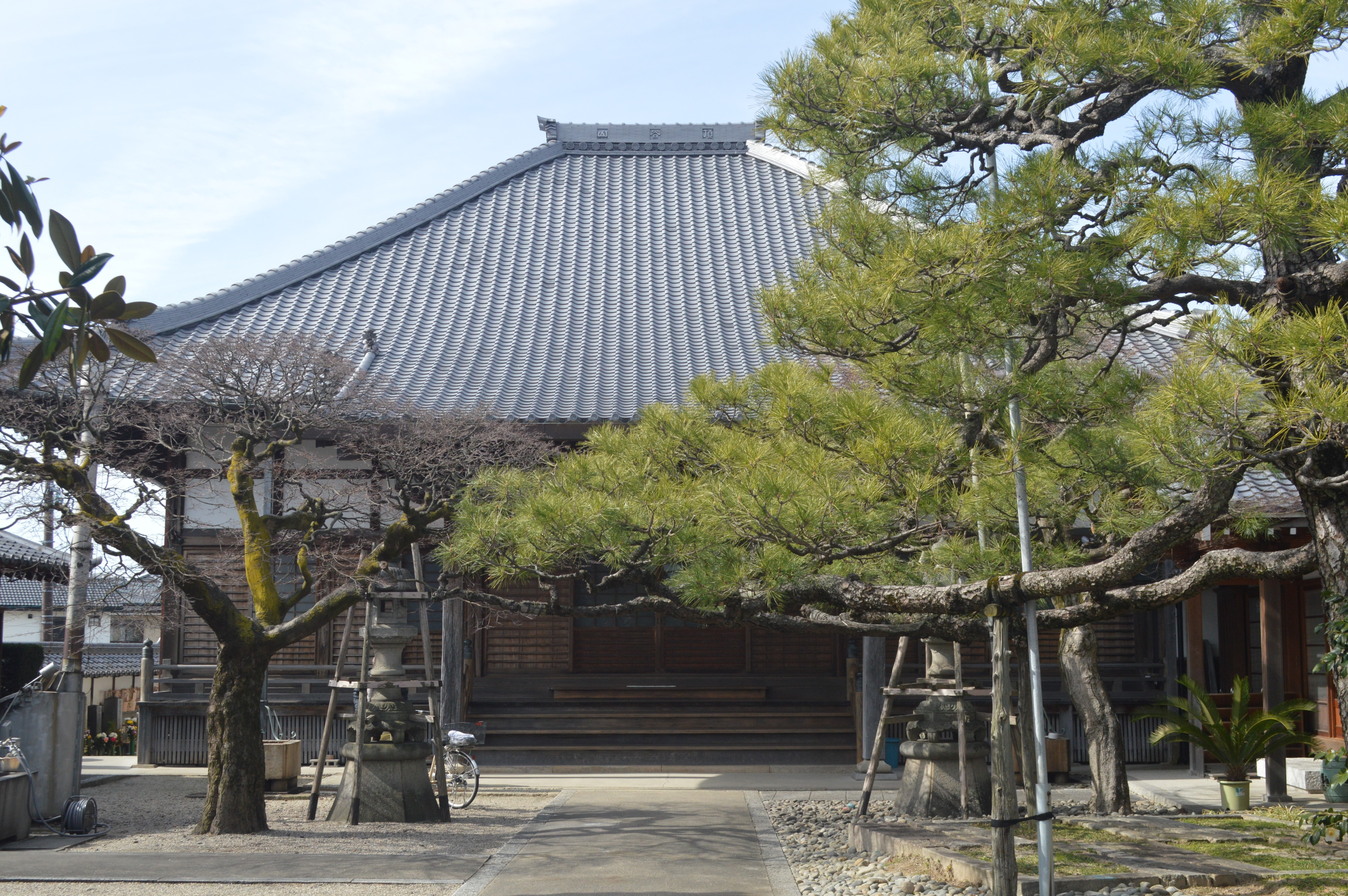 愛知県西尾市順海町12にある唯法寺。